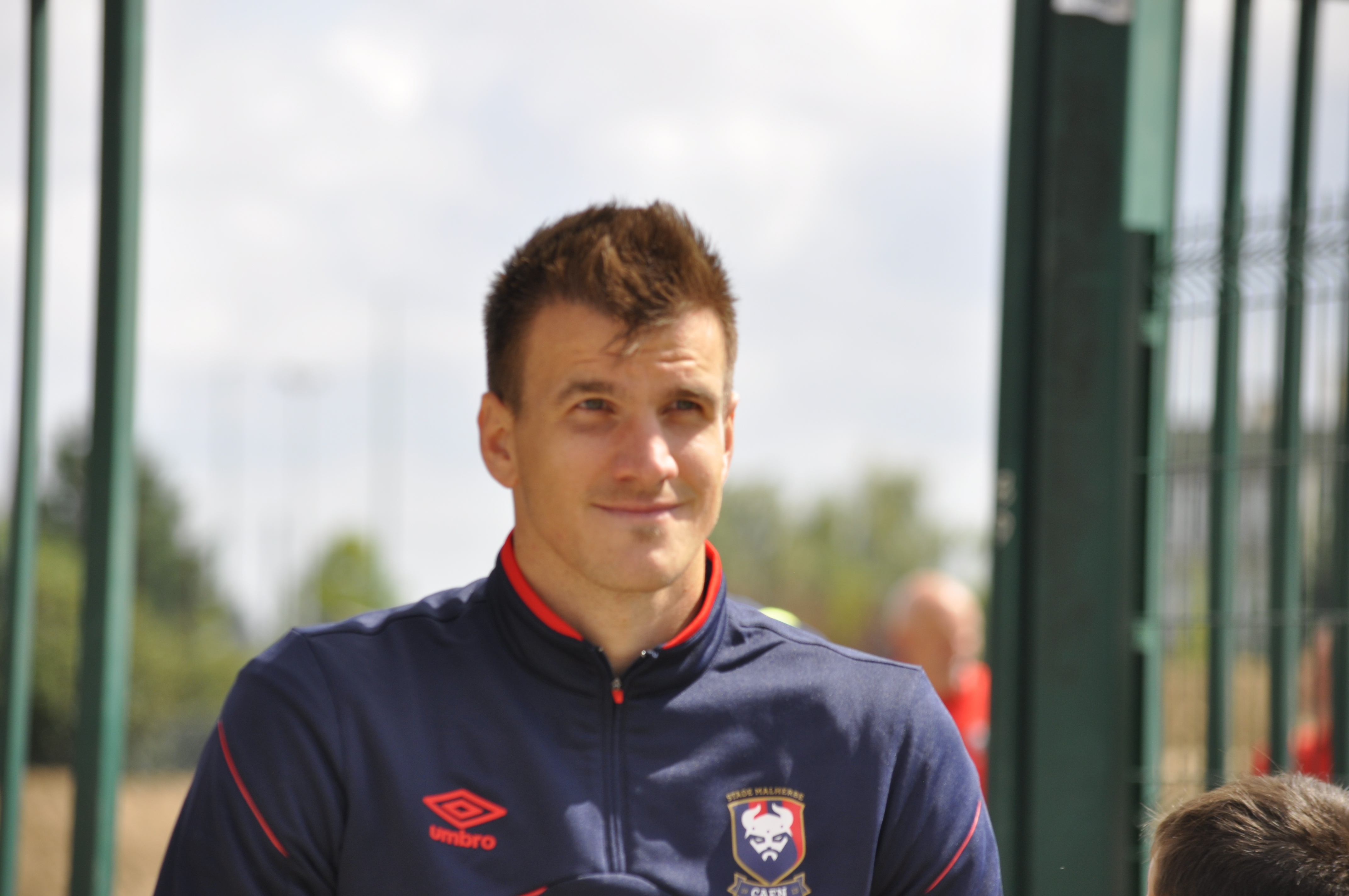 Ivan Santini à l'entrainement du Stade Malherbe Caen